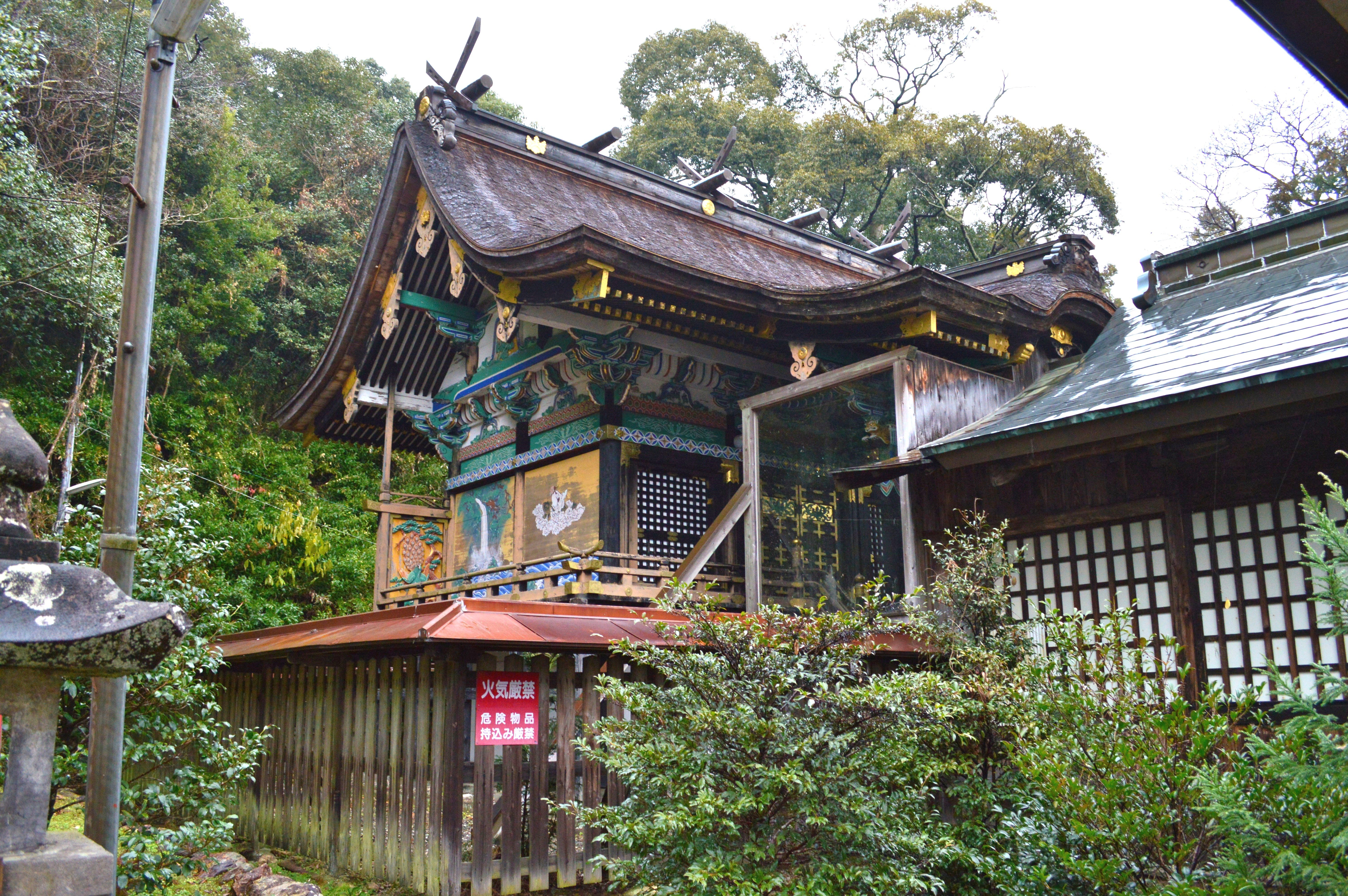 朝倉神社 (高知市) 本殿